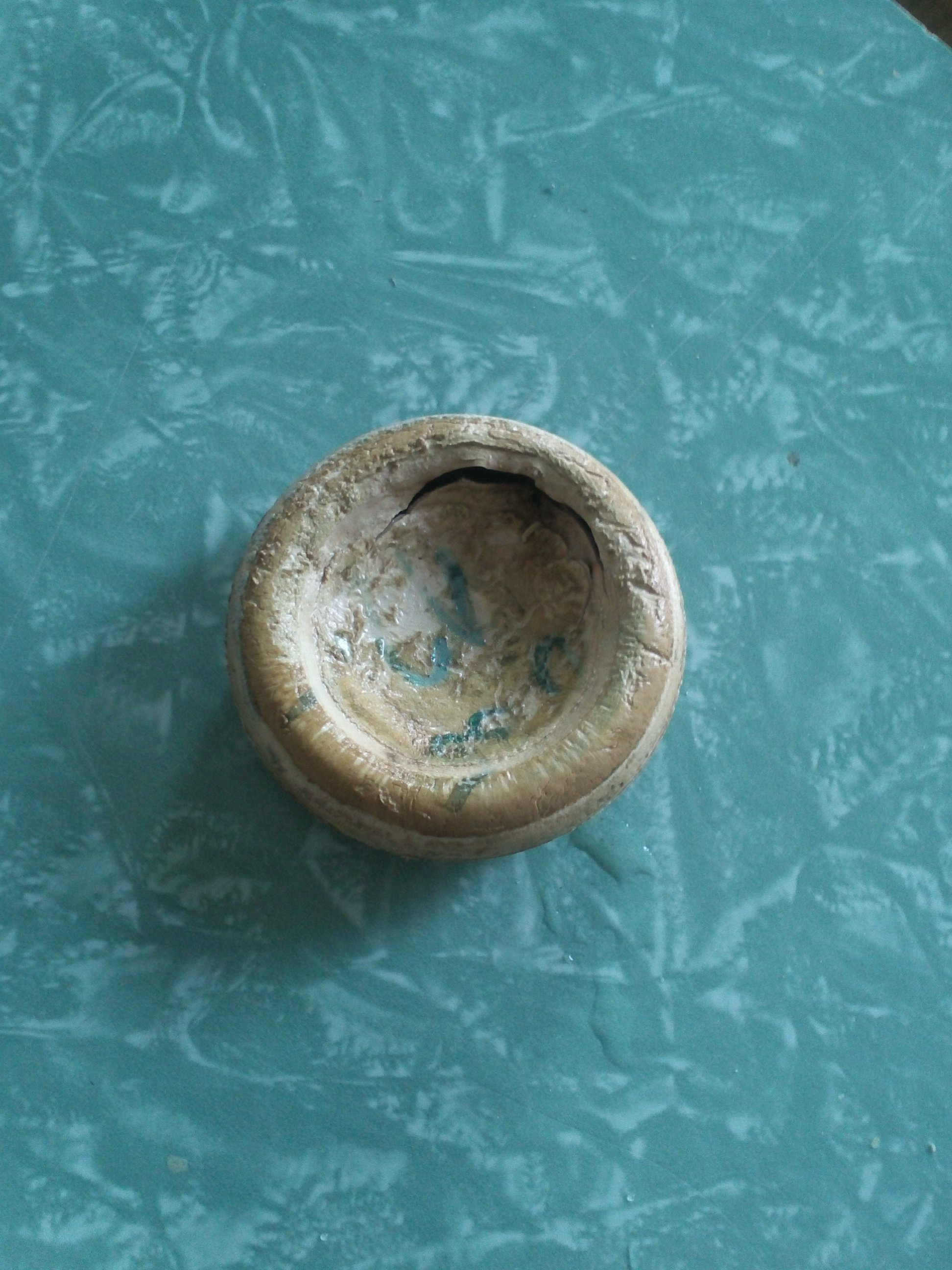 Karma Mora PO 35.